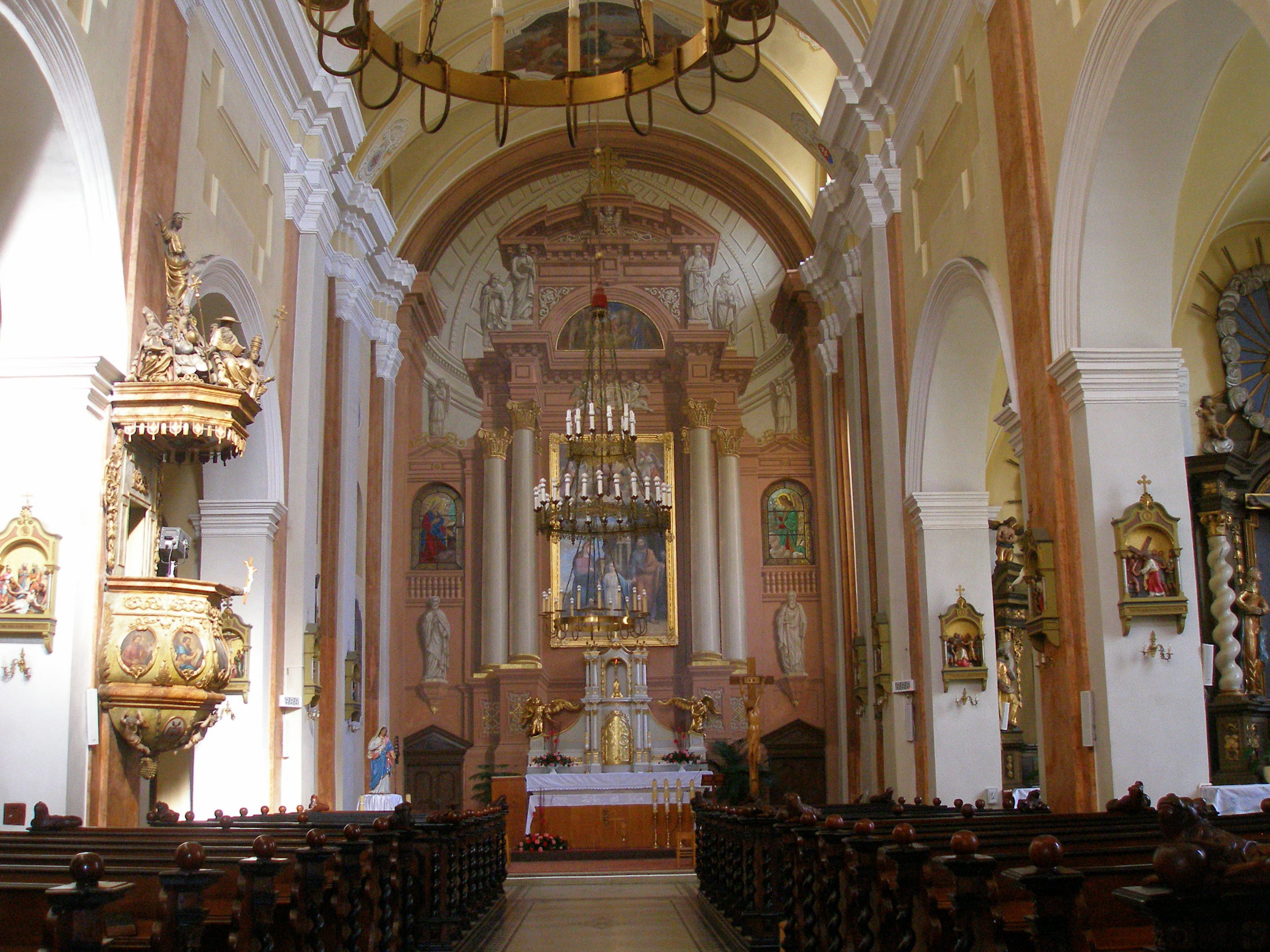 Kostol svätého Jozefa (františkánsky) Pôvodne gotický jednoloďový kostol karmelitánov z roku 1380. V druhej polovici 17. storočia prestavaný pre františkánov. Barokovú úpravu ukončil staviteľ Ján Tornyossi v rokoch 1709 až 1718. Sochy svätcov na fasáde sú z dielne Šimona Griminga z roku 1734.